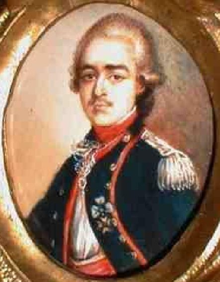 médaillon